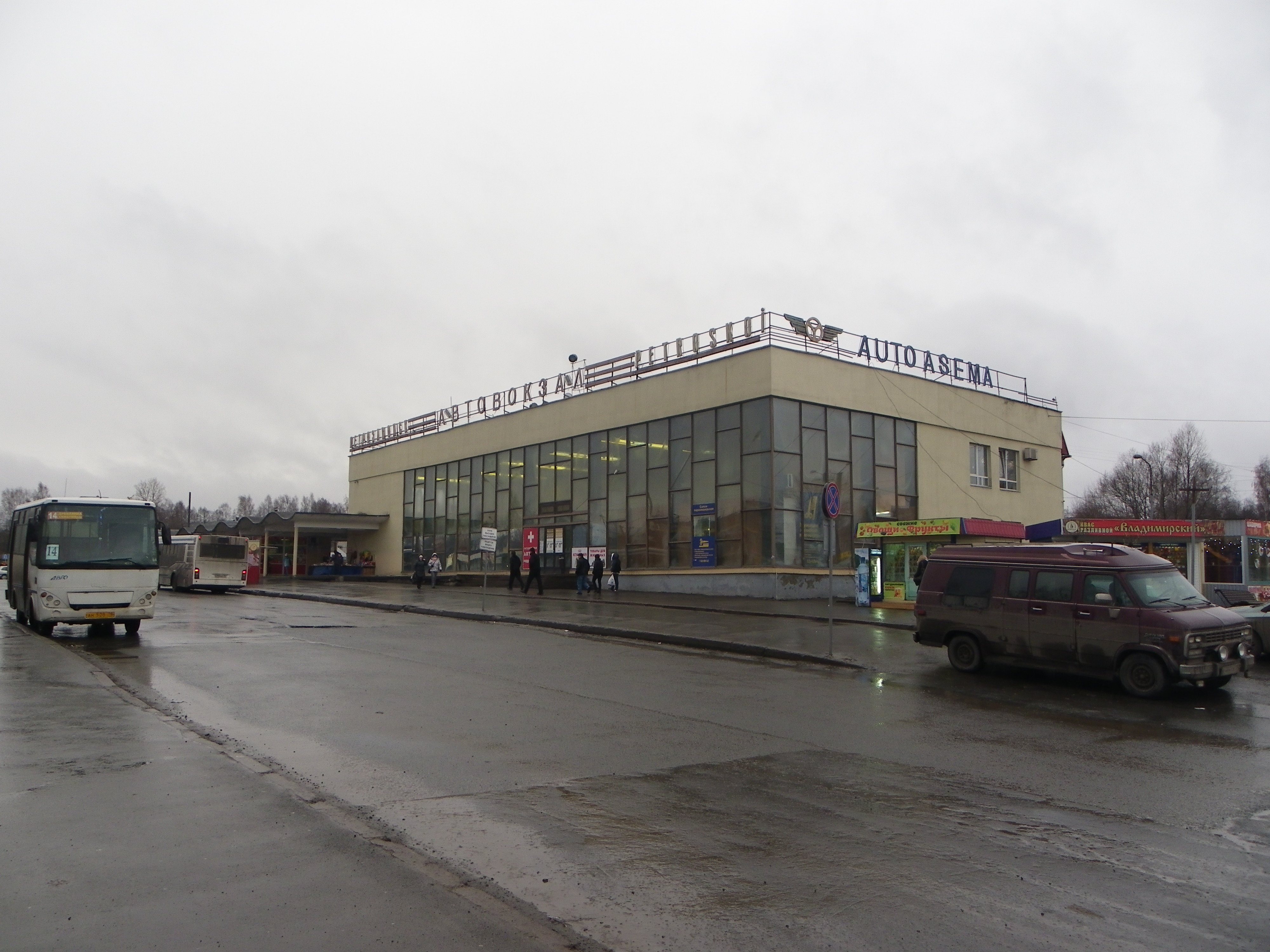 Автовокзал г. Петрозаводска